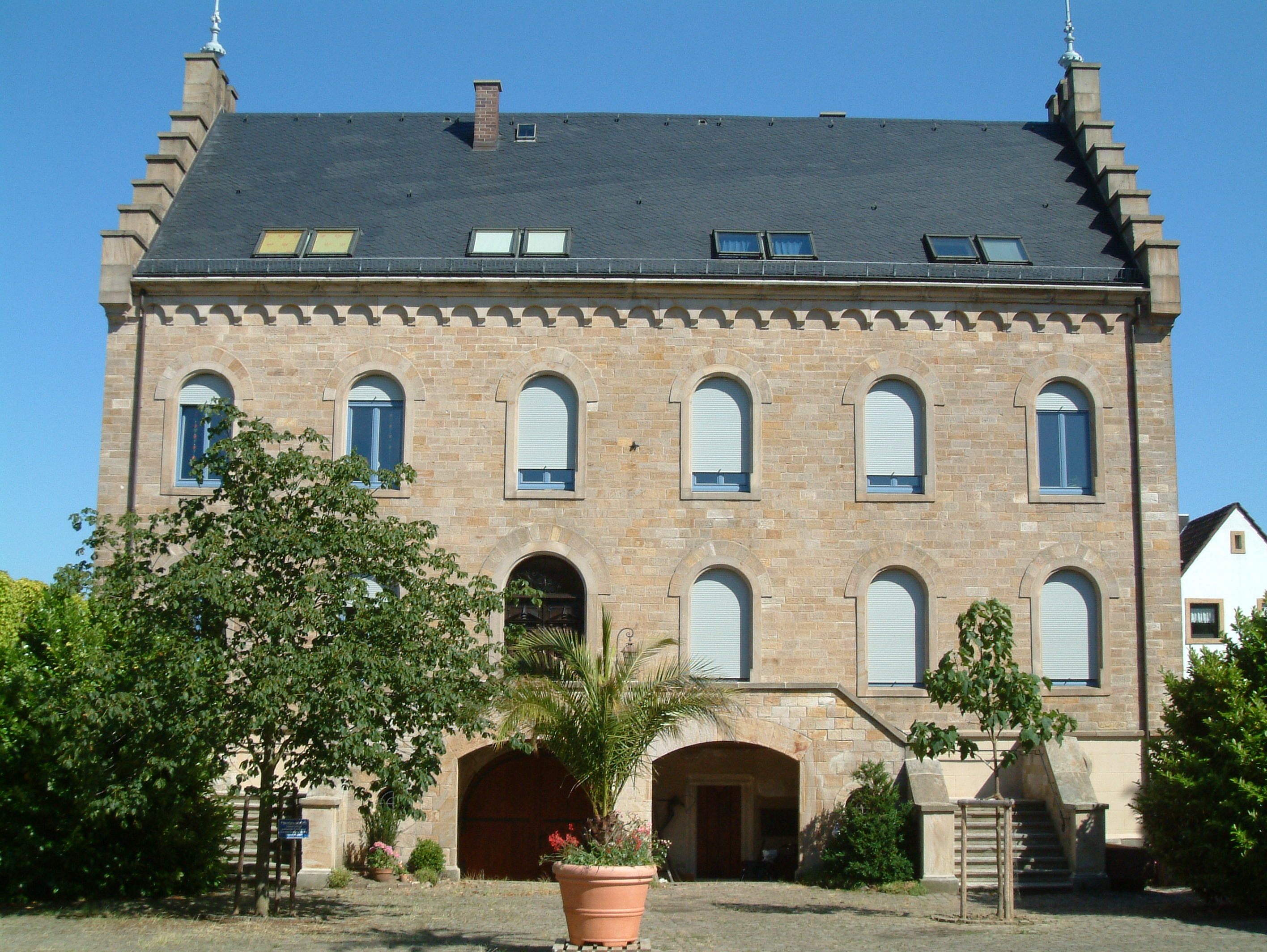 Weißes Haus (Herrenhaus) zu Mußbach, selbst fotografiert am 2006-07-02 und freigegeben durch Benutzer:Mundartpoet